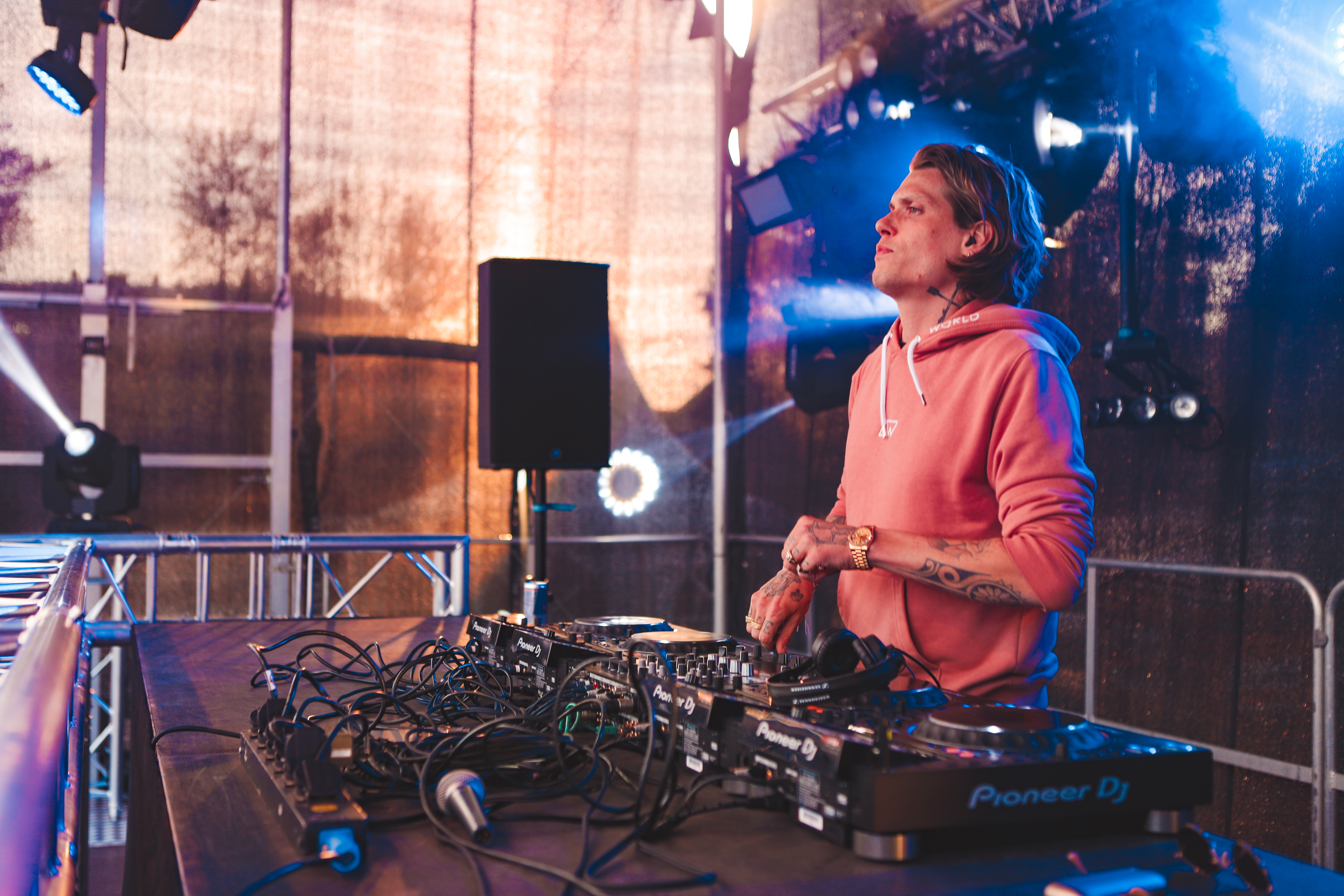 Tony Junior tijdens een optreden in Emmen (2019